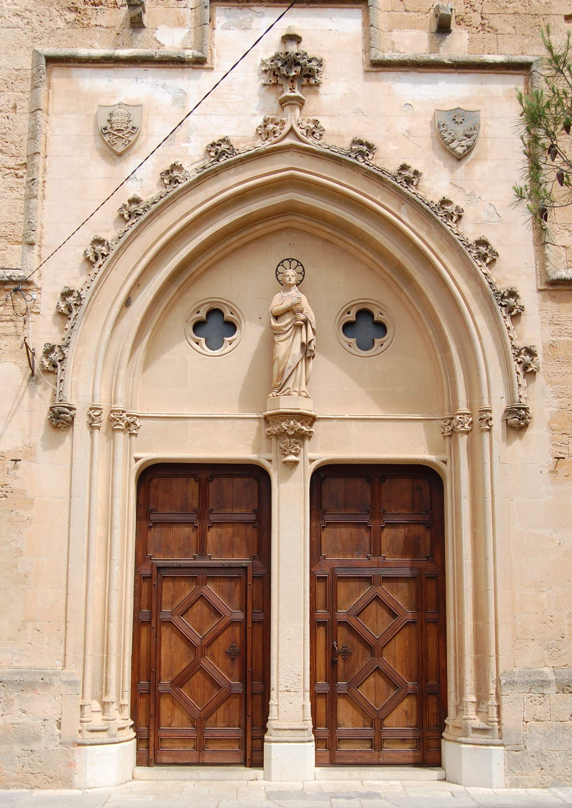 Eingangsportal zur Pfarrkirche San Pere in Petra (Mallorca)